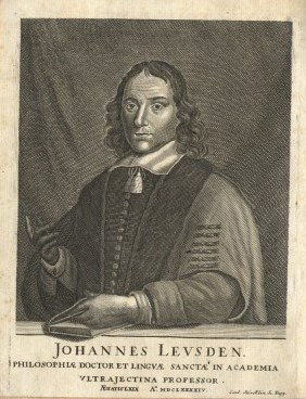 יוהאן לסדן, פורטרט שהודפס בספרו "פילולוגיה עברית" (Philologus Hebraeus)(1739)